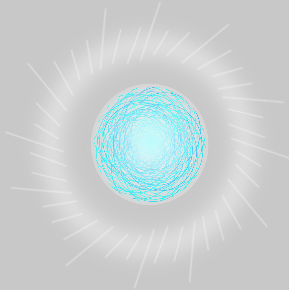 razengan, naruto